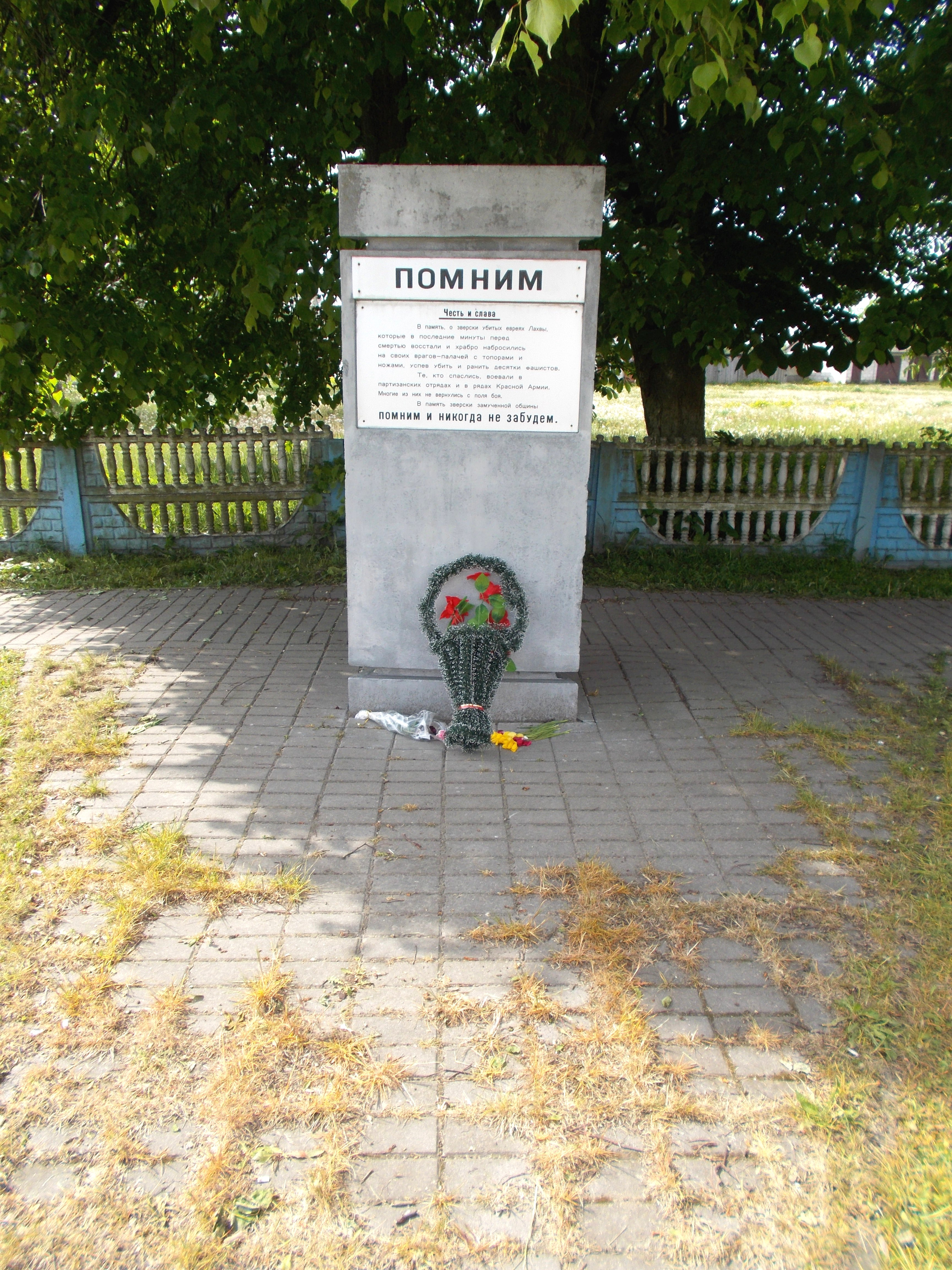 Памятник евреям Лахвы, восставшим в гетто против нацистов. Находится на центральной площади деревни.